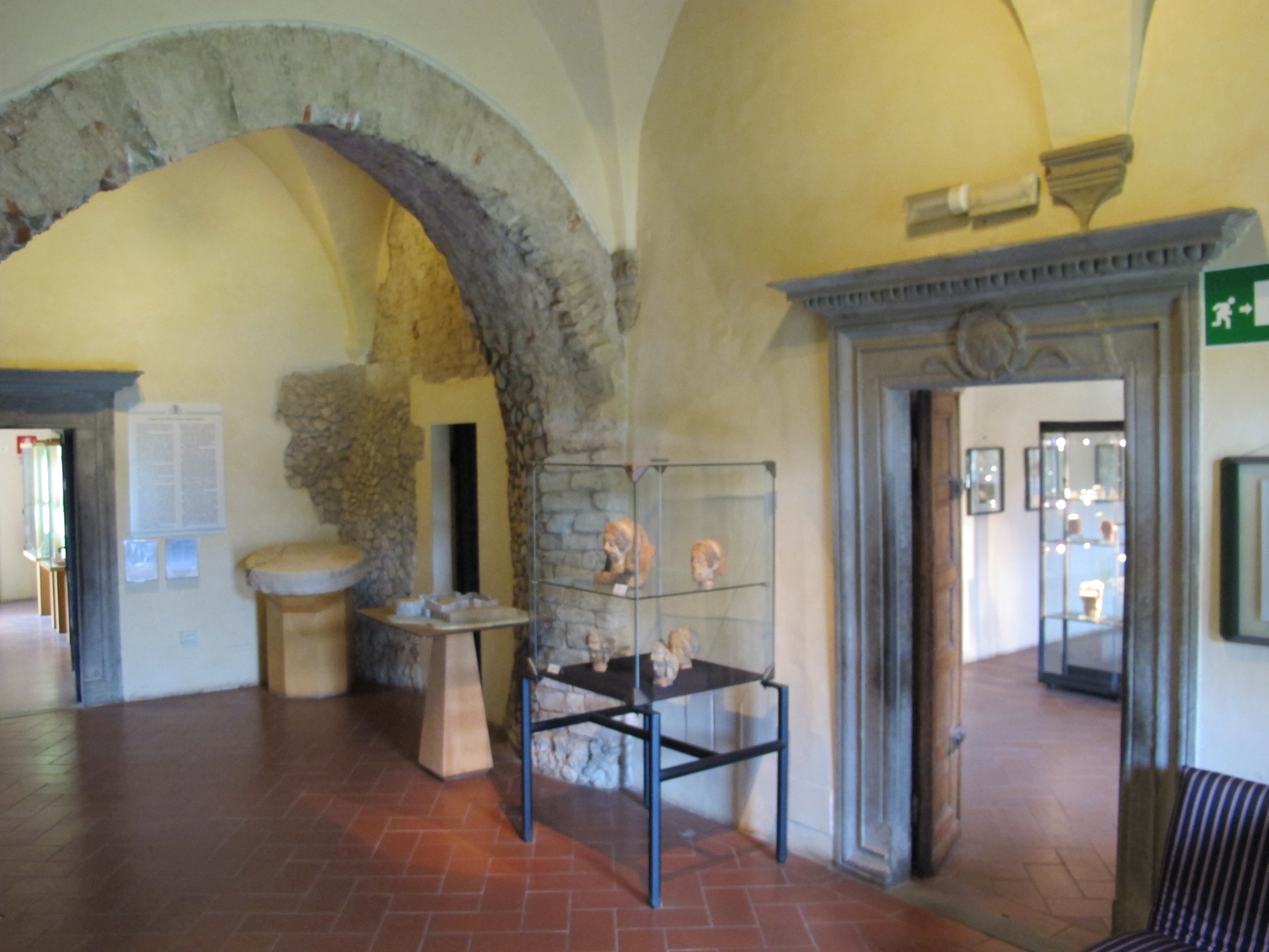 Museo Archeologico Nazionale G.C.Mecenate - MIBAC This is a photo of a monument which is part of cultural heritage of Italy.